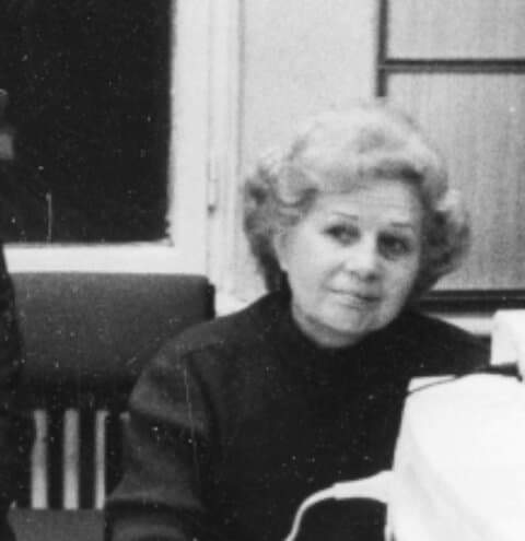 Gencsy Sári operaénekes, egyetemi tanár (1924-2008), 1975-ben a Magyar Rádió stúdiójában